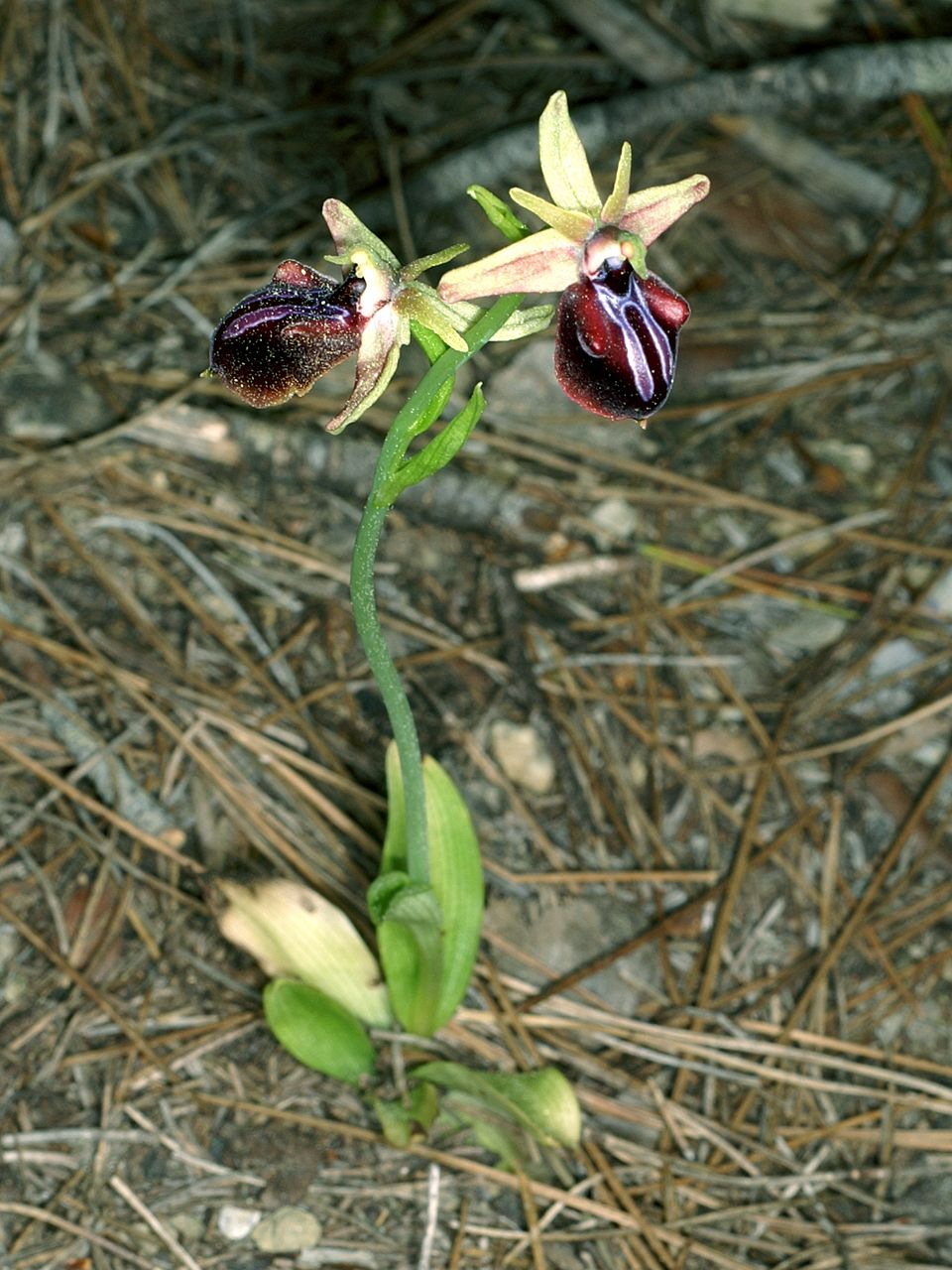 Ophrys mammosa - plant